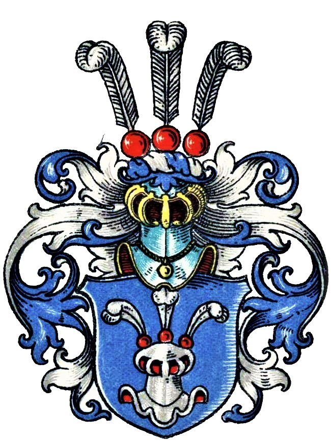 Wappen der Frese; aus Ostfriesland stammendem, altadligem Geschlecht, das die Meppenburg bei Alkhausen besaß. → Eintrag im WWA